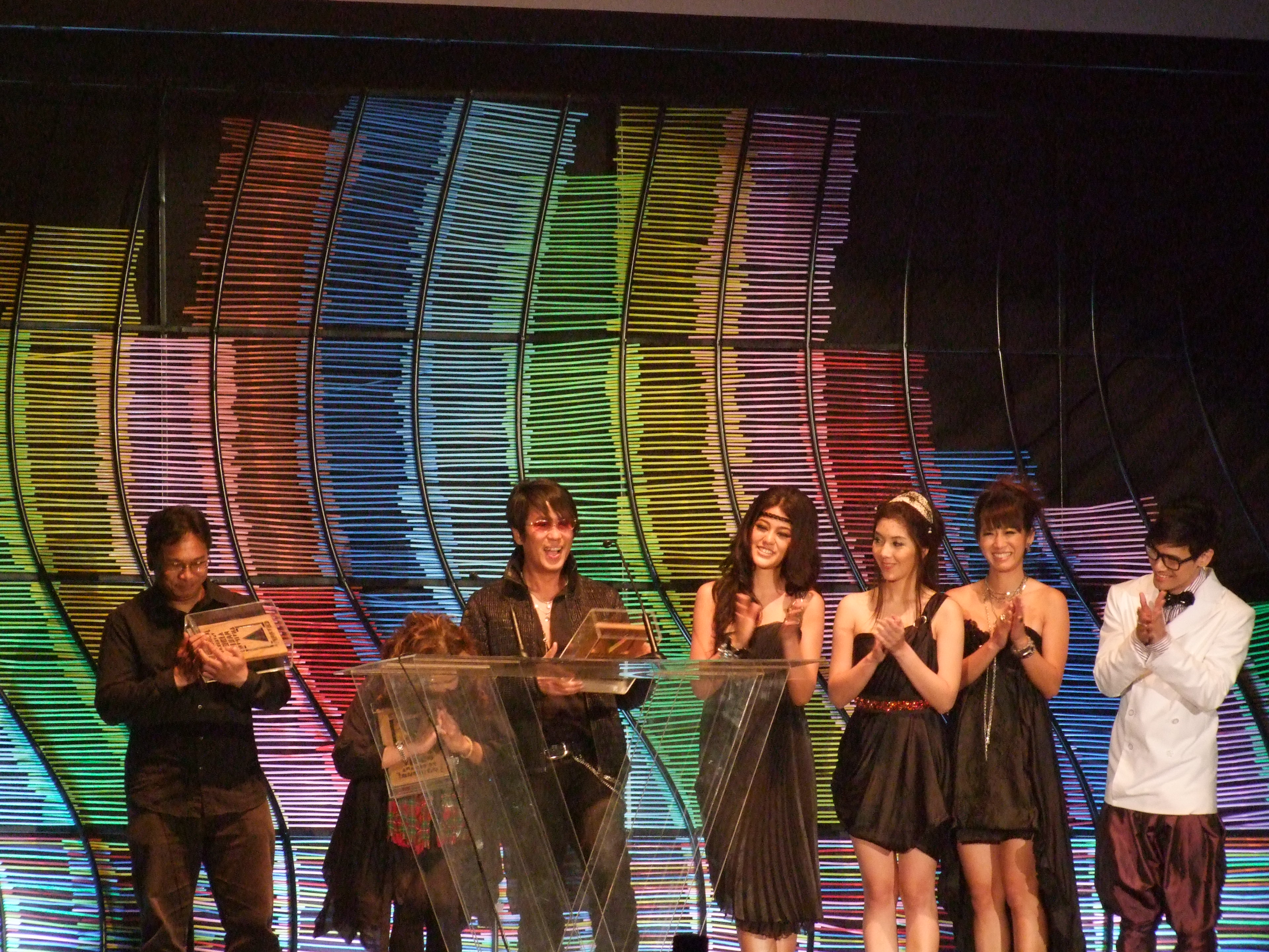 ธงไชย แมคอินไตย์ รับรางวัลพิเศษ ไทยประดิษฐ์ คอนเสิร์ตแบบเบิร์ดเบิร์ด จากงาน channel v thailand วันที่ 22 สิงหาคม 2552